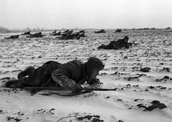 Контрнаступление советских войск под Москвой (1941)